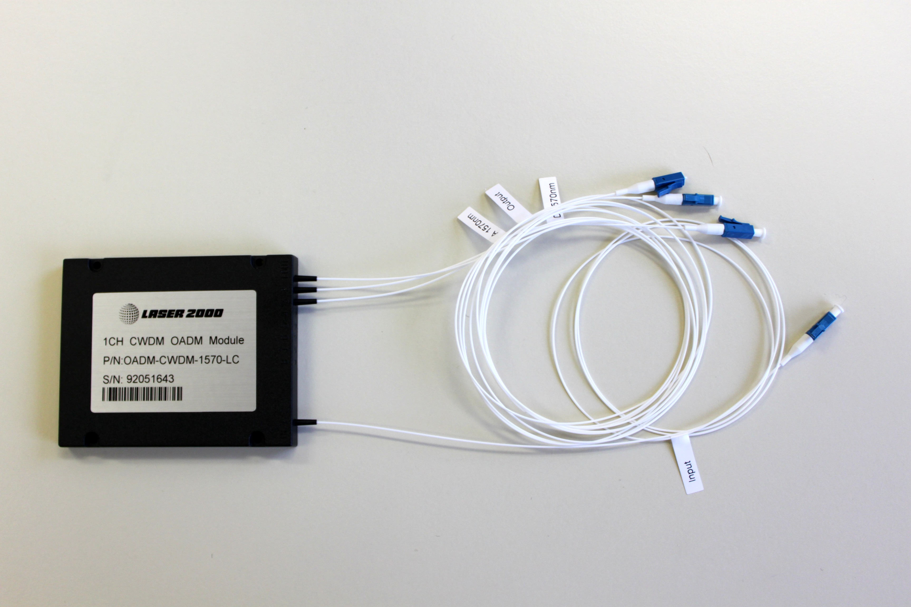 Optical Add-Dropp Module